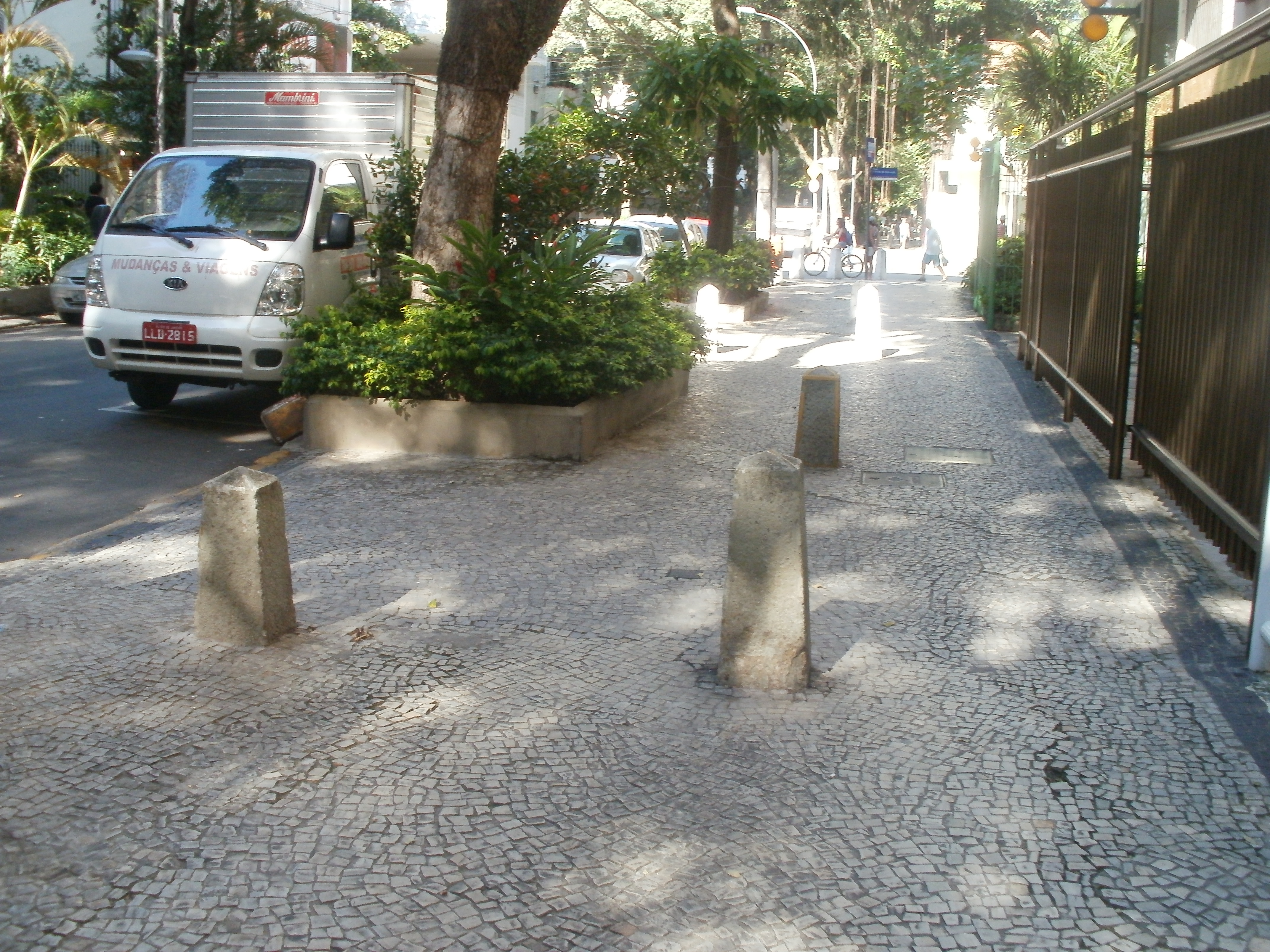 Rua Nascimento Silva, em Ipanema, cidade do Rio de Janeiro, Brasil.